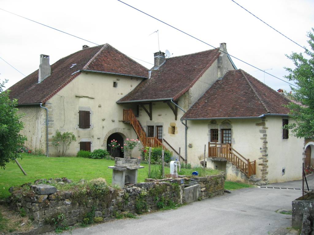 Saint Lothain - Village viticole de caractère du Jura